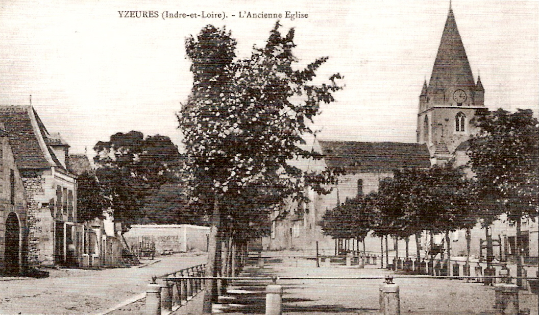 Carte postale de l'ancienne église détruite en 1895